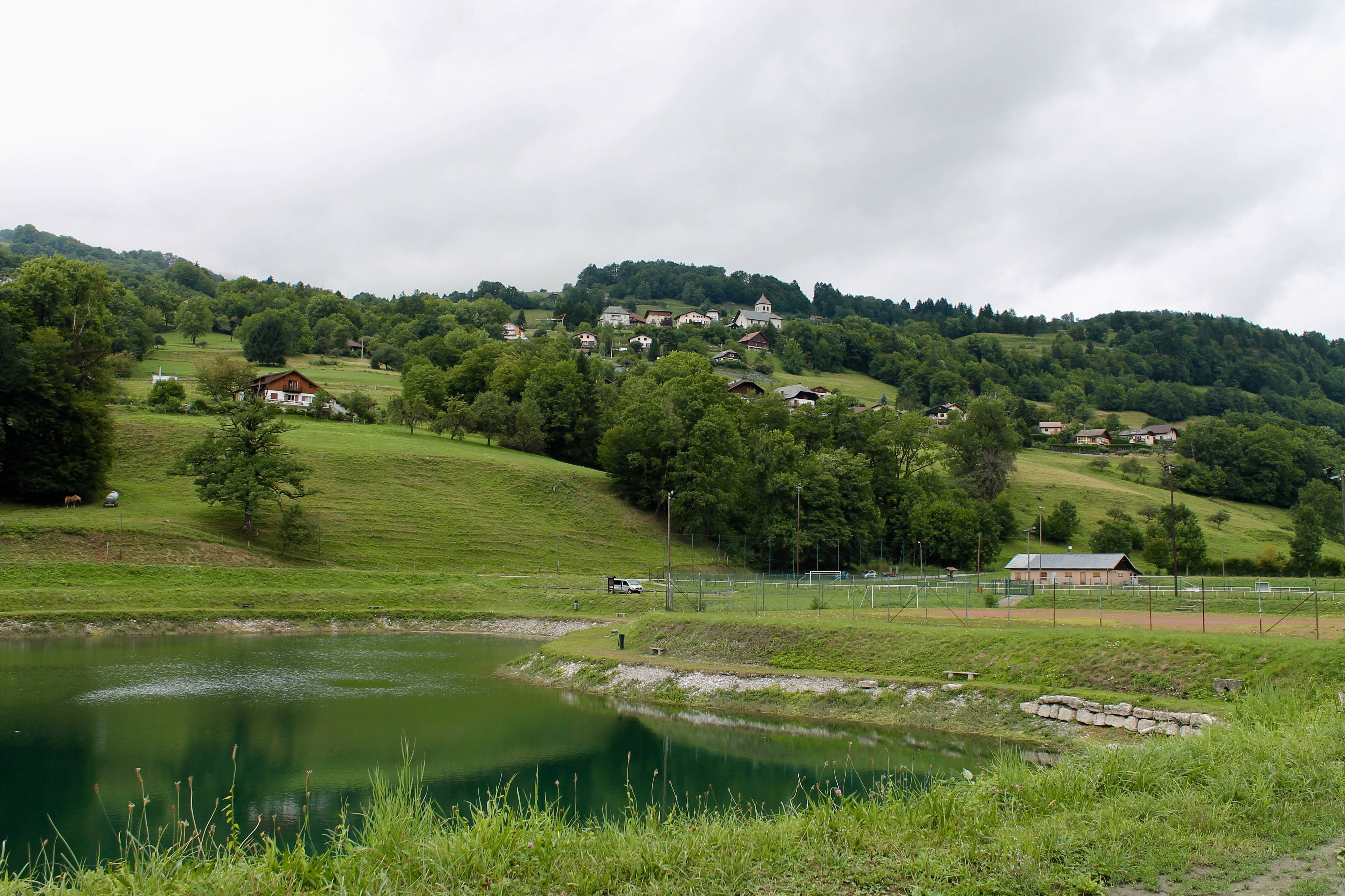 Vue du chef-lieu de Marthod depuis le plan d'eau de la Plaine.